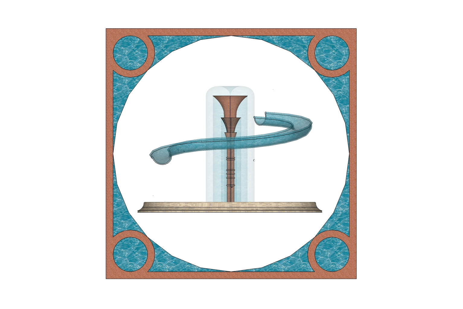 logo lázní Chrastava